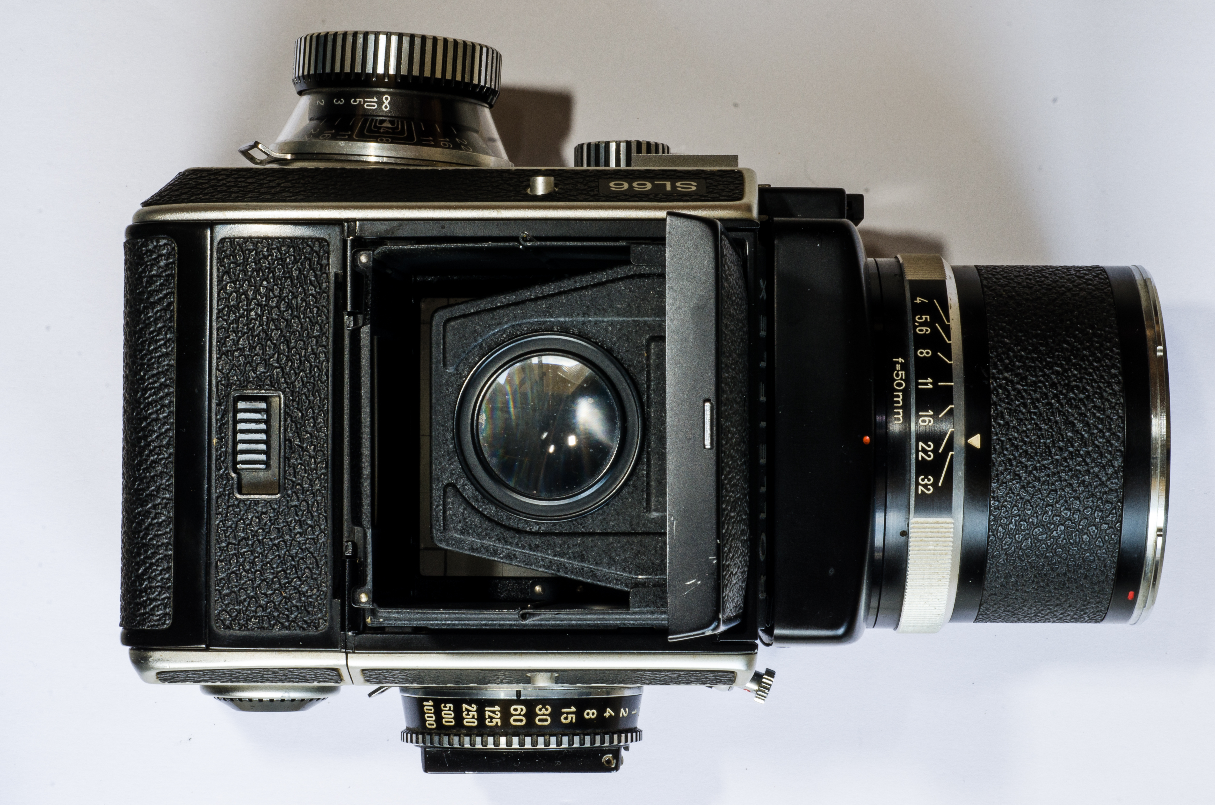 Rolleiflex SL66 en plongée, viseur ouvert et loupe enclenchée.